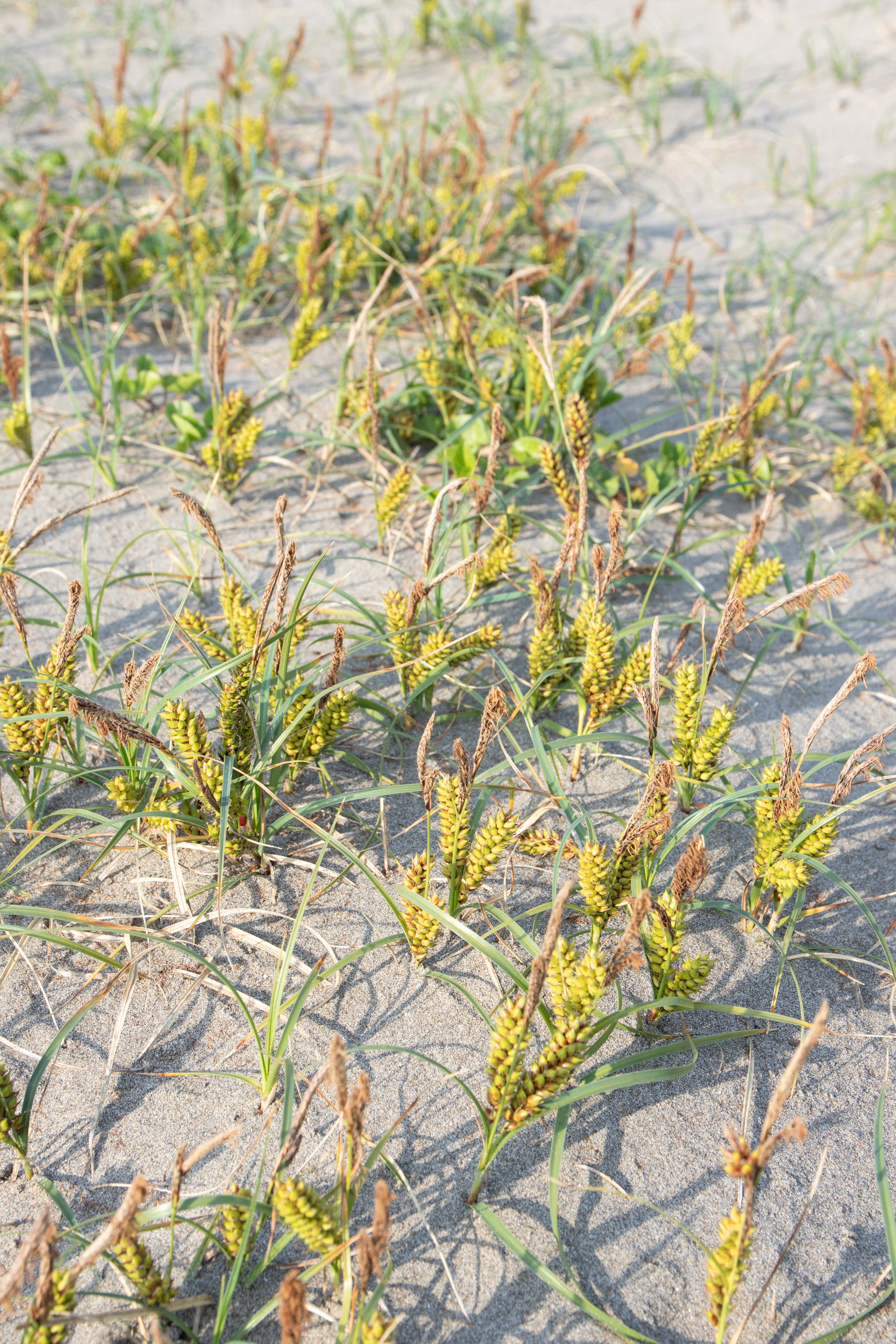 コウボウシバ (学名:Carex pumila) 撮影地：平井海岸（茨城県鹿嶋市） Canon EOS 80D + Sigma 17-70mm F2.8-4 DC Macro OS HSM